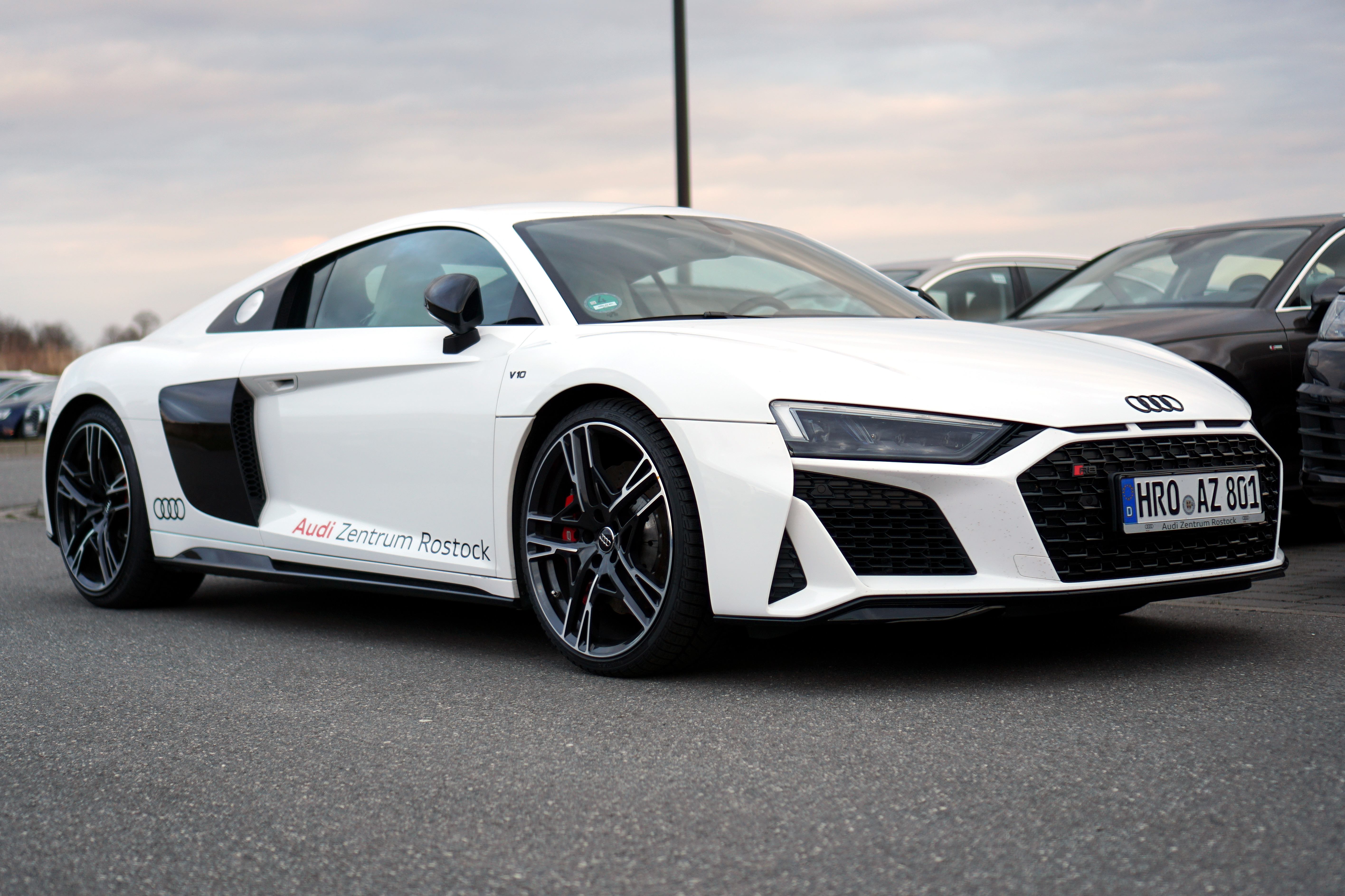 R8 Coupé V10 performance mit Aluminium-Vollfräsräder – 20 Zoll – im 5-Doppelspeichen-Dynamik-Design in Anthrazitschwarz glänzend, glanzgedreht Größe 8,5 J × 20 vorn und 11 J × 20 hinten, mit Reifen 245/30 R 20 vorn und 305/30 R 20 hinten LED-Scheinwerfer, abgedunkelt, mit dynamischem Blinklicht und Audi Laserlicht, inklusive Fernlichtassistent - Suzukagrau Metallic